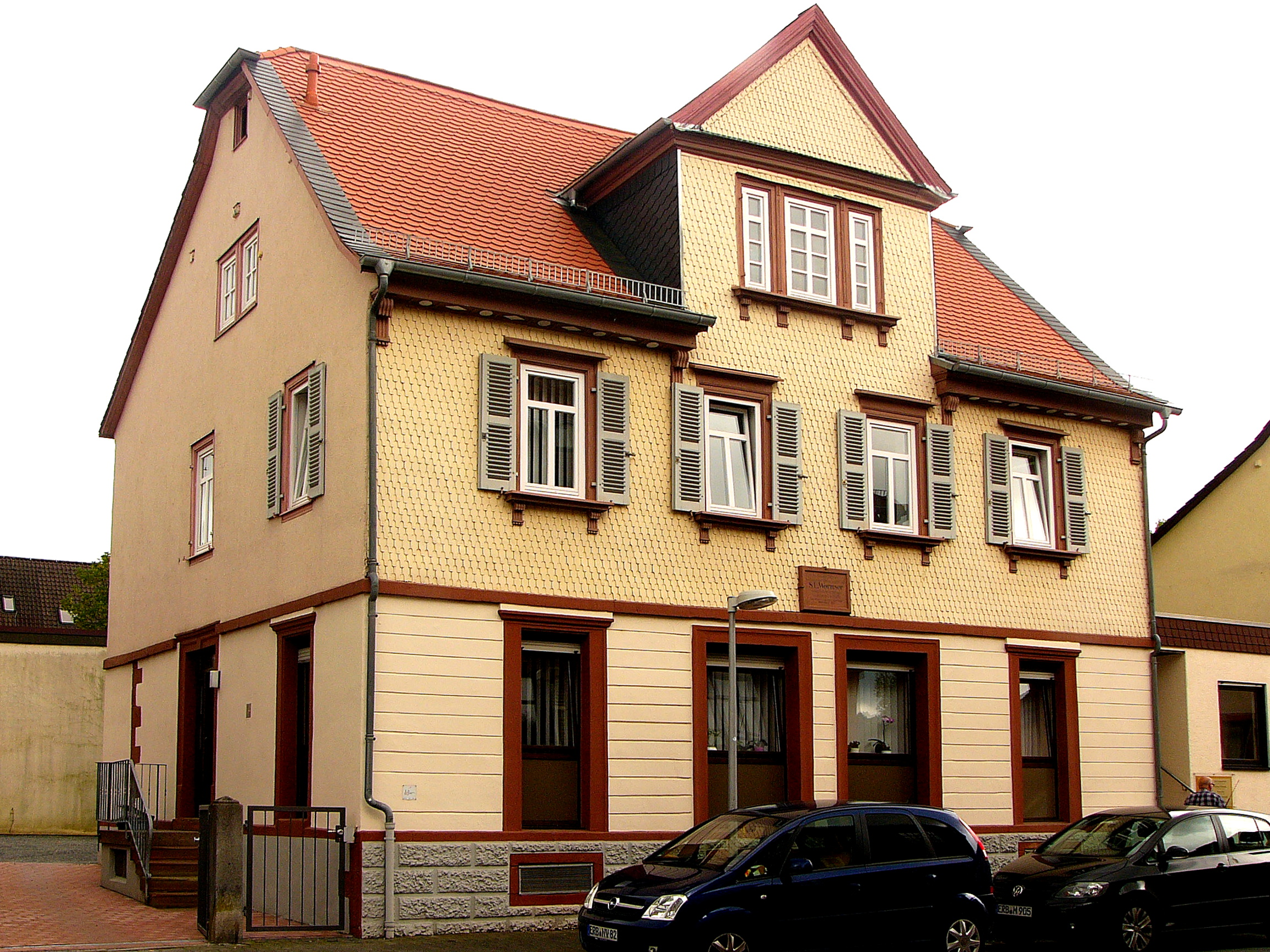 Zweistöckiges, traufständiges Doppelhaus von 1821 mit massivem Erdgeschoß, verschindeltem Fachwerkobergeschoß und Krüppelwalmdach mit Zwerchhaus. Städtebaulich wichtiges Gebäude in schmucklosem klassizistischem Stil; Traufenschalung mit Rauten und Sonnenrädern verziert. Von geschichtlicher Bedeutung als Wohnsitz des berühmten Gelehrten und Rabbiners Sekel-Löb Wormser (von 1826 bis 1847). Im Garten eine aus Eisenpfosten und Ziegeldach errichtete Hütte, die als "Laubhütte" diente.